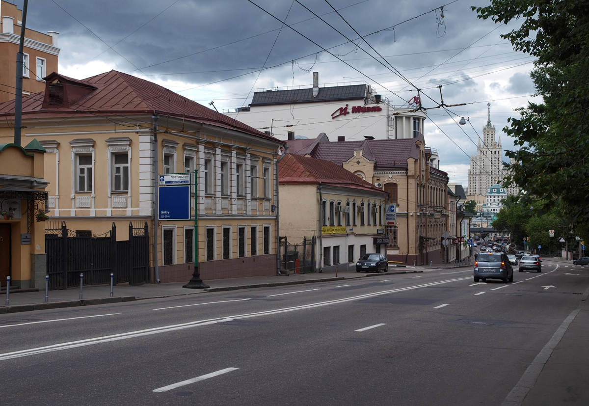 Nikoloyamskaya Street, Moscow.Николоямская улица, Москва.